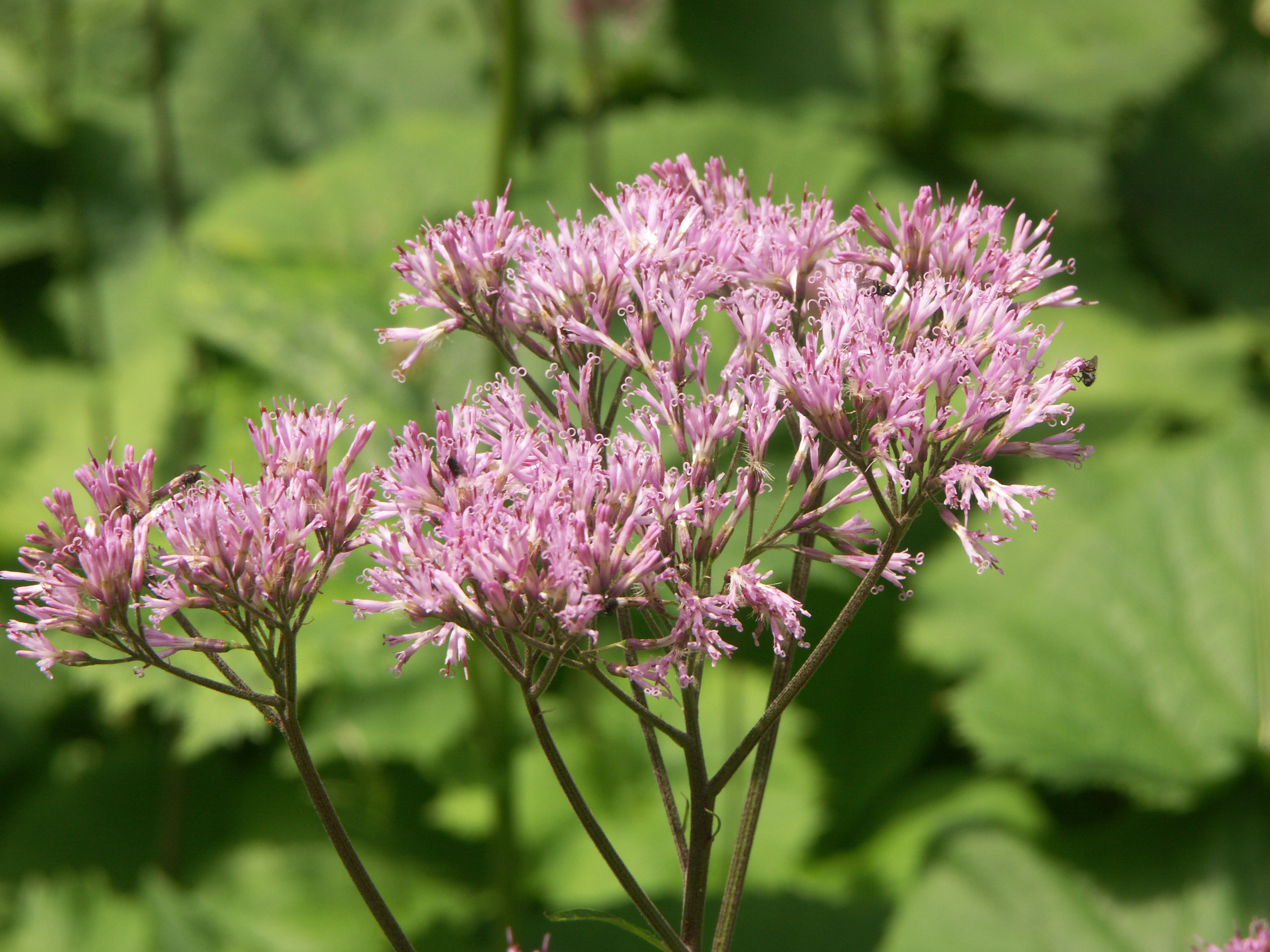 Grauer Alpendost (Adenostyles alliariae), Blütenstand, Norditalien, westlich des Passo Rolle